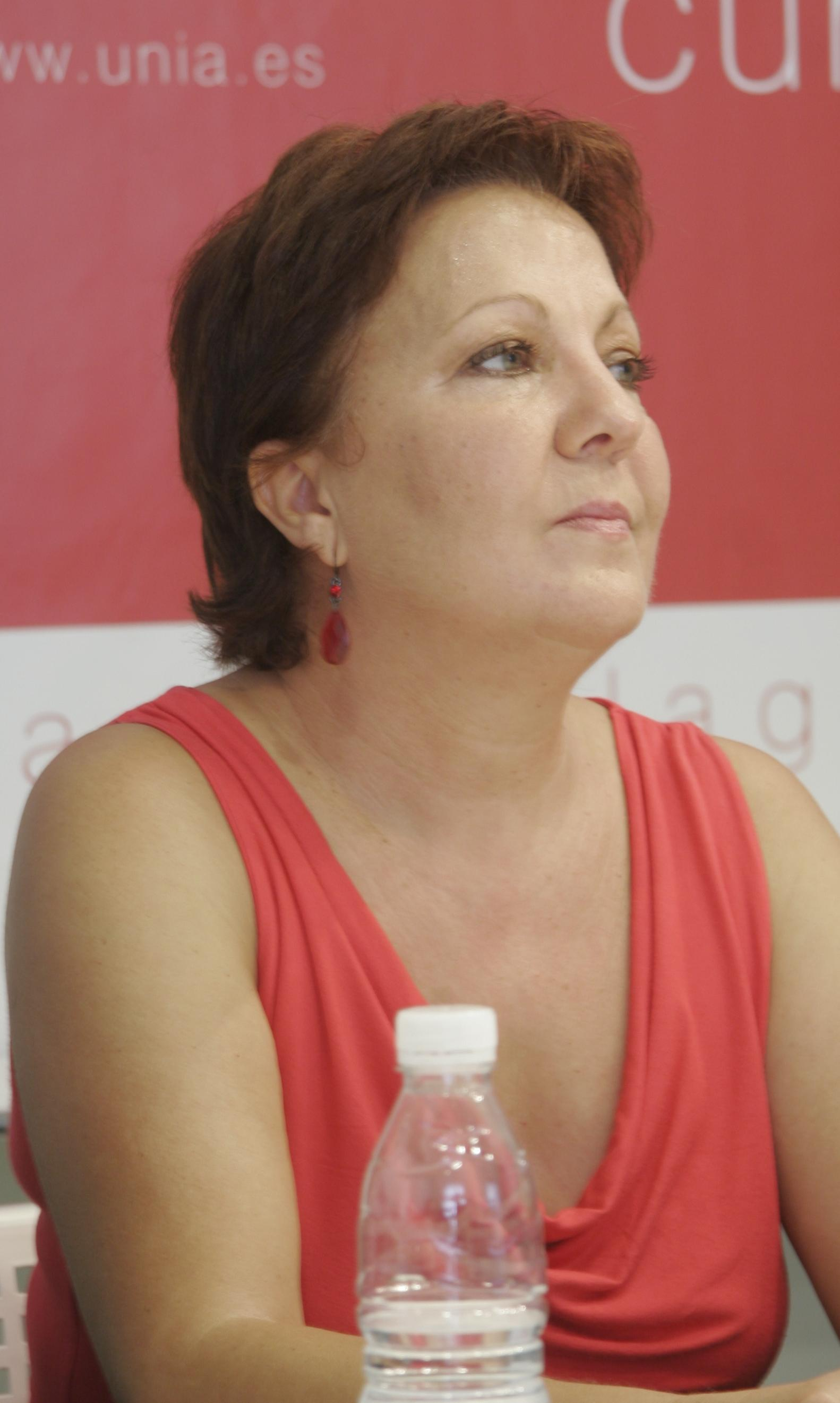 Carmen Linares, cantaora de flamenco. Ponente en el curso "Los flamencos hablan de sí mismos II", en los Cursos de Verano 2007 de la Universidad Internacional de Andalucía.